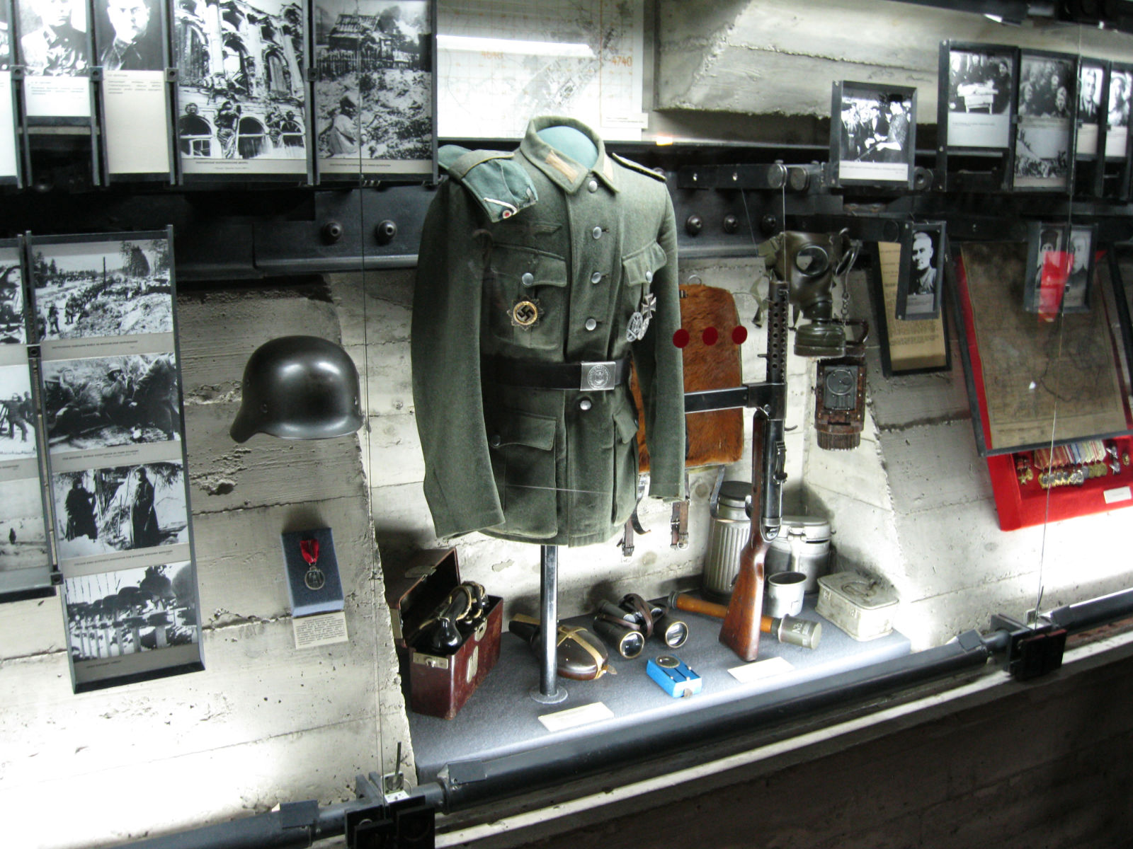 Экспонаты музея-панорамы «Сталинградская битва». Обмундирование военнослужащего вермахта